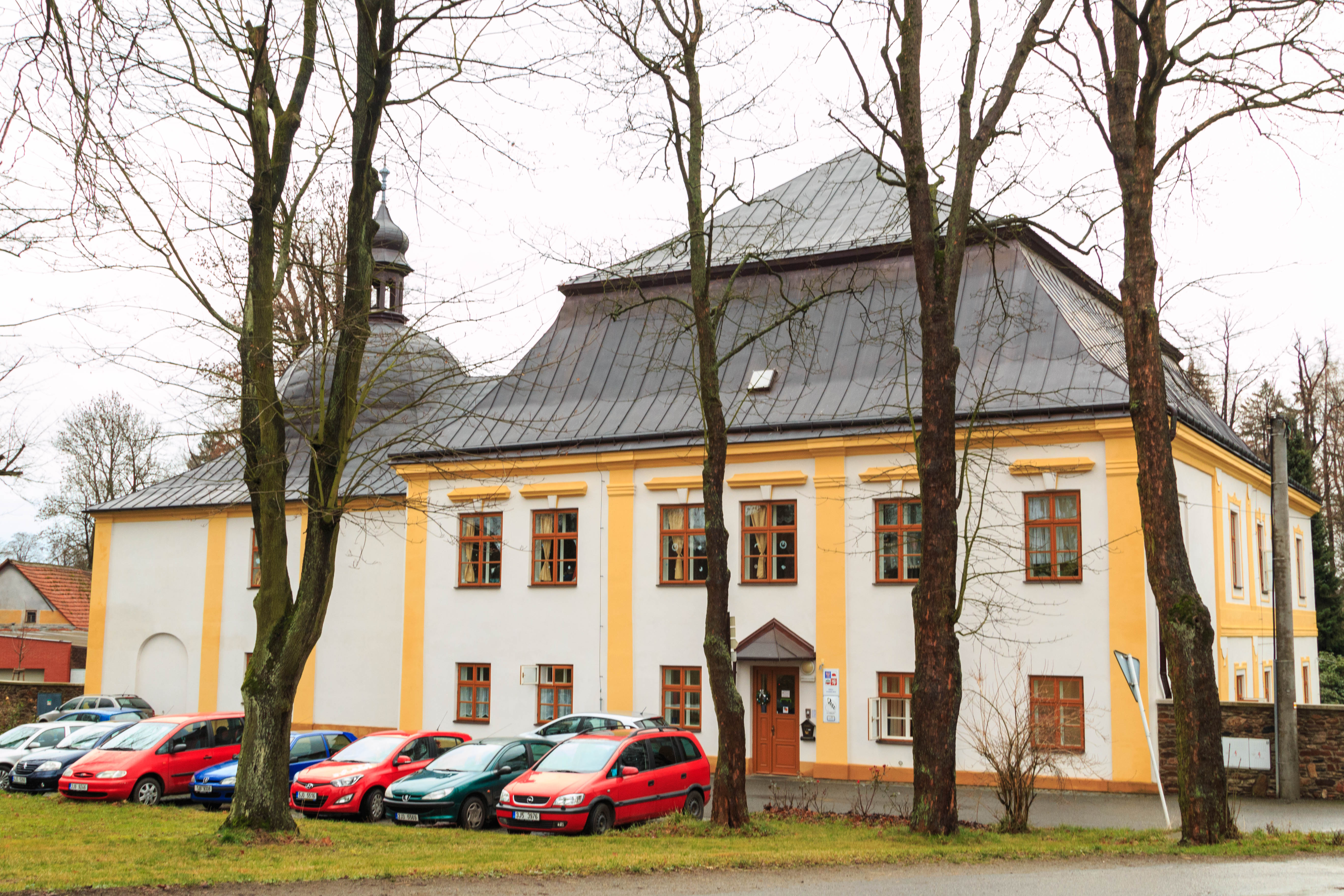 Zámek Zboží, JV strana návsi 1, Zboží, Zboží (Habry).